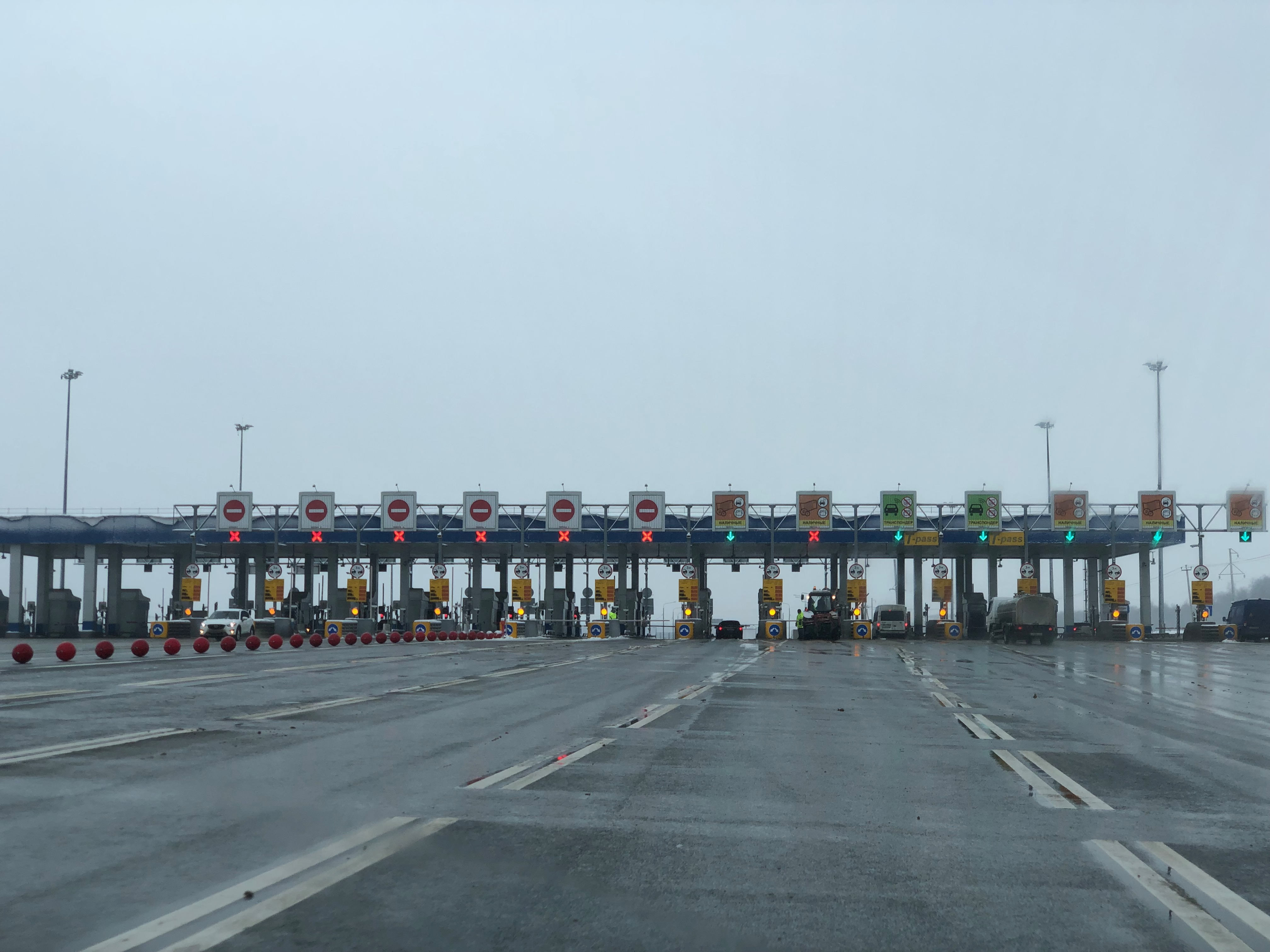 М3